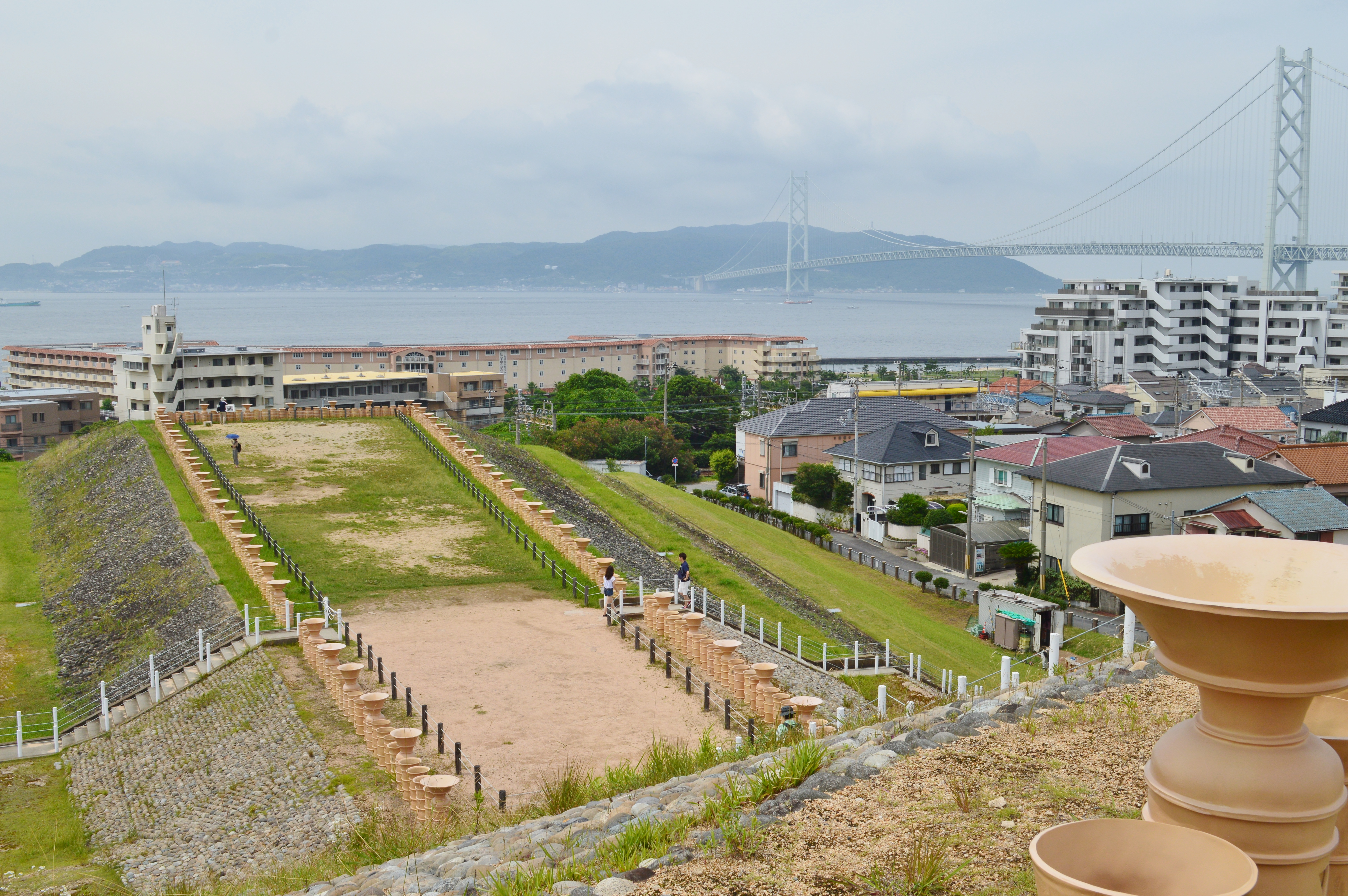 五色塚古墳 後円部から前方部を望む